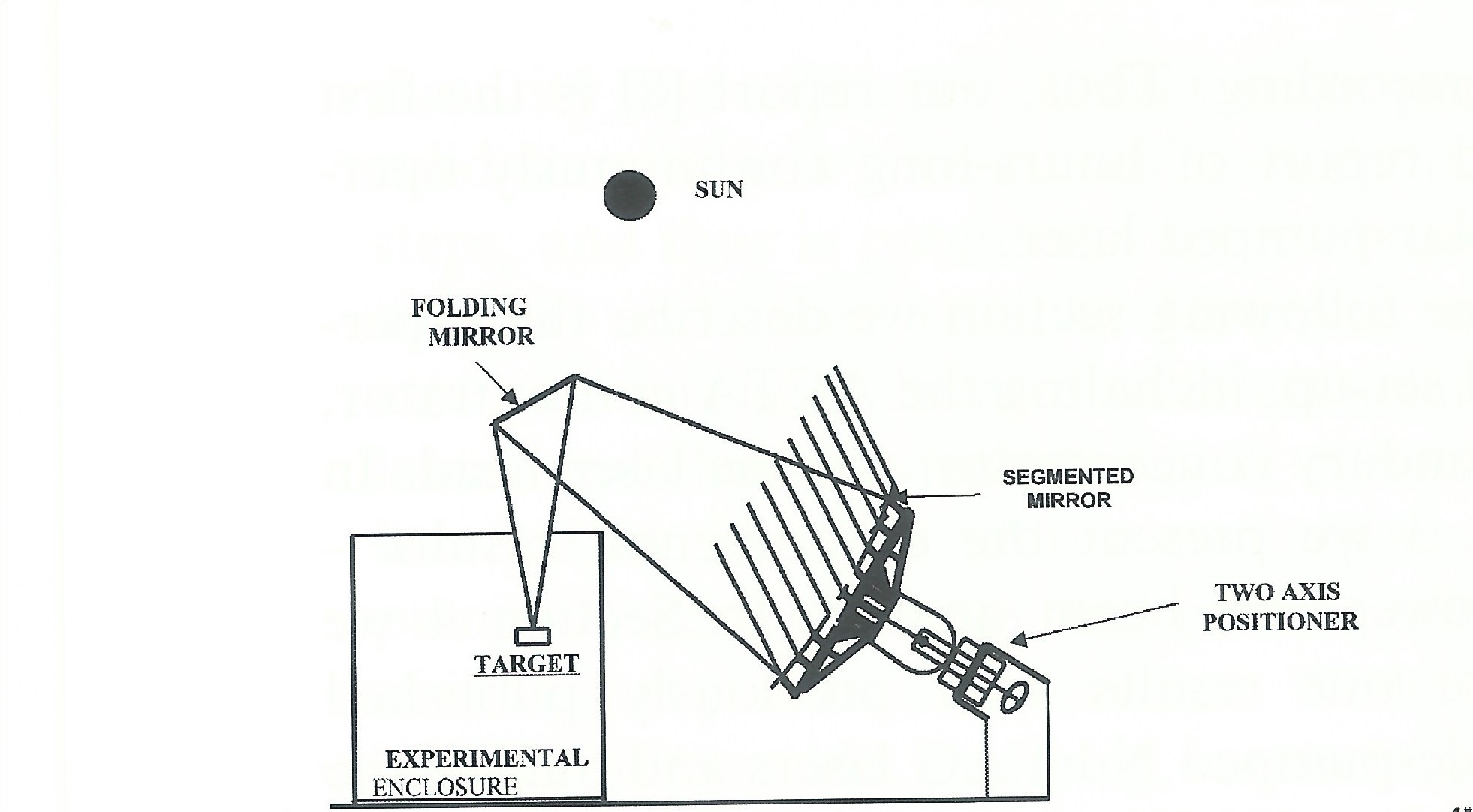 מרכז שמש עם ציר סיבוב בכיוון המטרה ותיקון אסטיגמטיות בהתאם לזוית בין כיוון השמש בצהרי היום ובין המטרה.